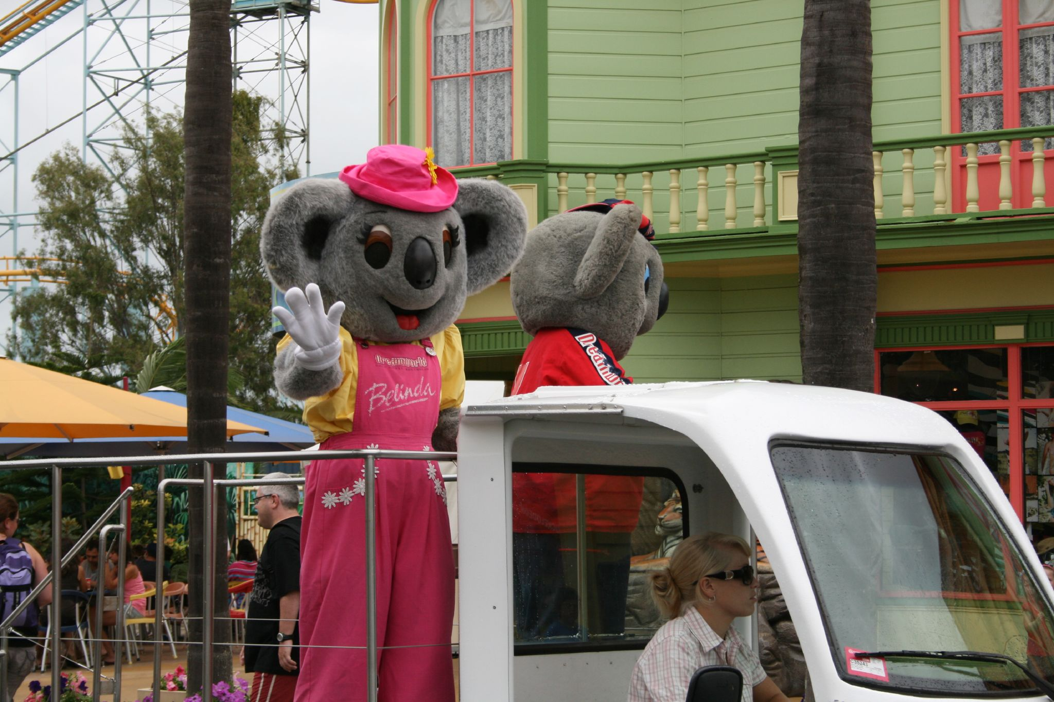 Belinda & Kenny